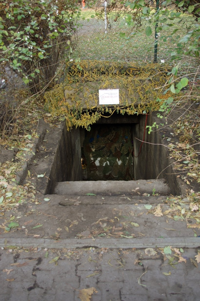 Wejście do schronu przeciwlotniczego LS-Deckungsgraben Nr2